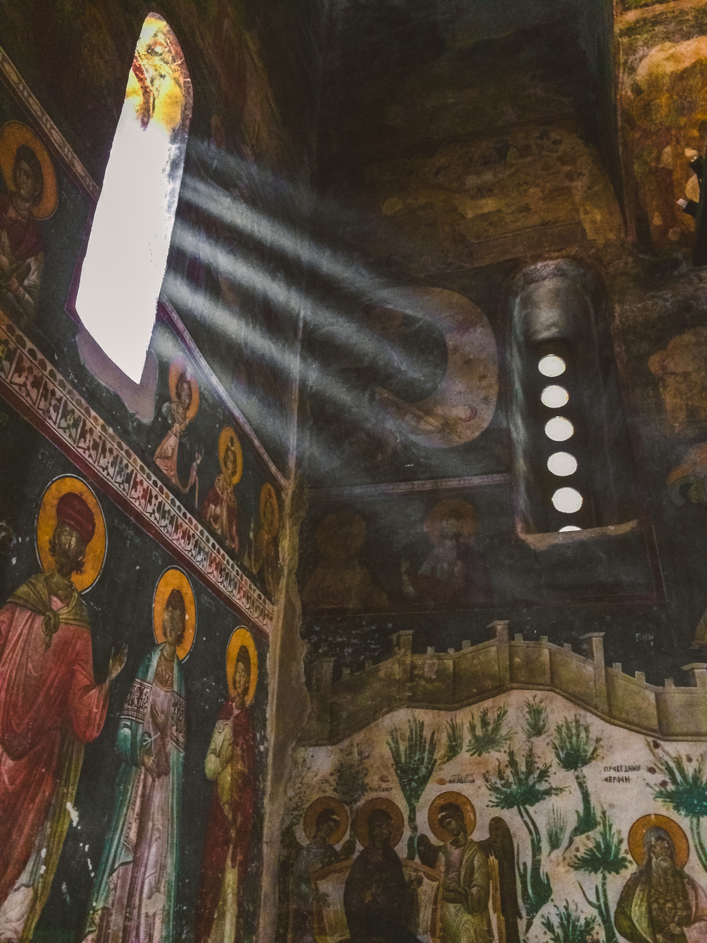 Nástěnné malby v klášteře Gračanica